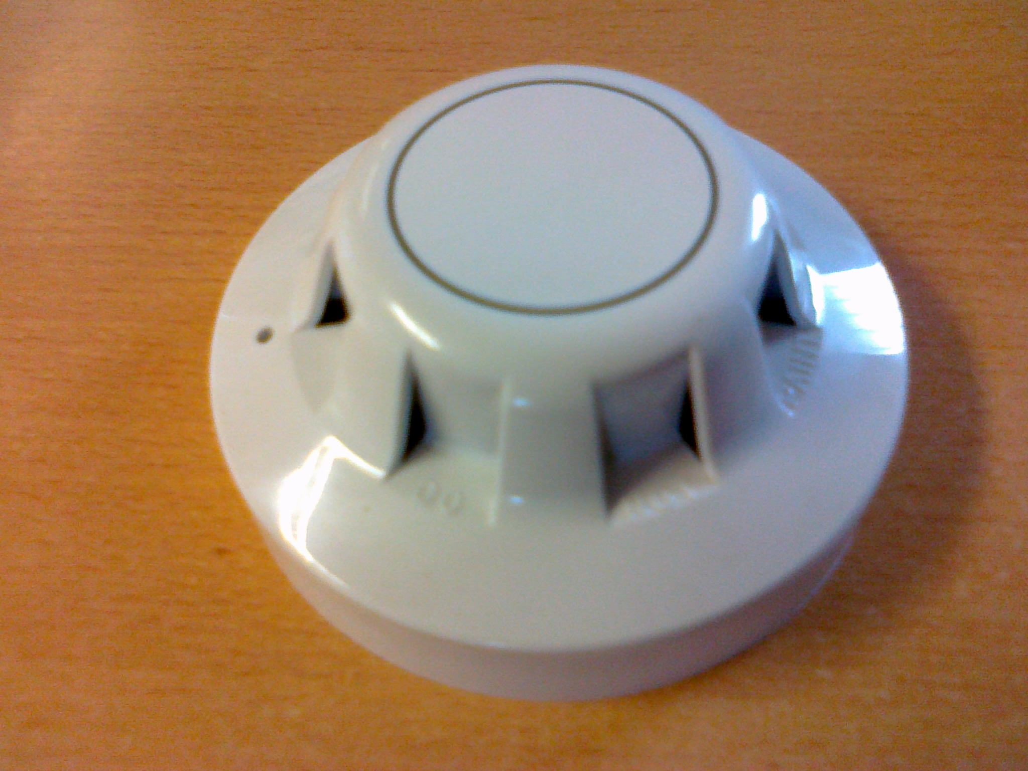 Optični detektor dima proizvajalca Apollo za povezavo na požarno-varnostni sistem.